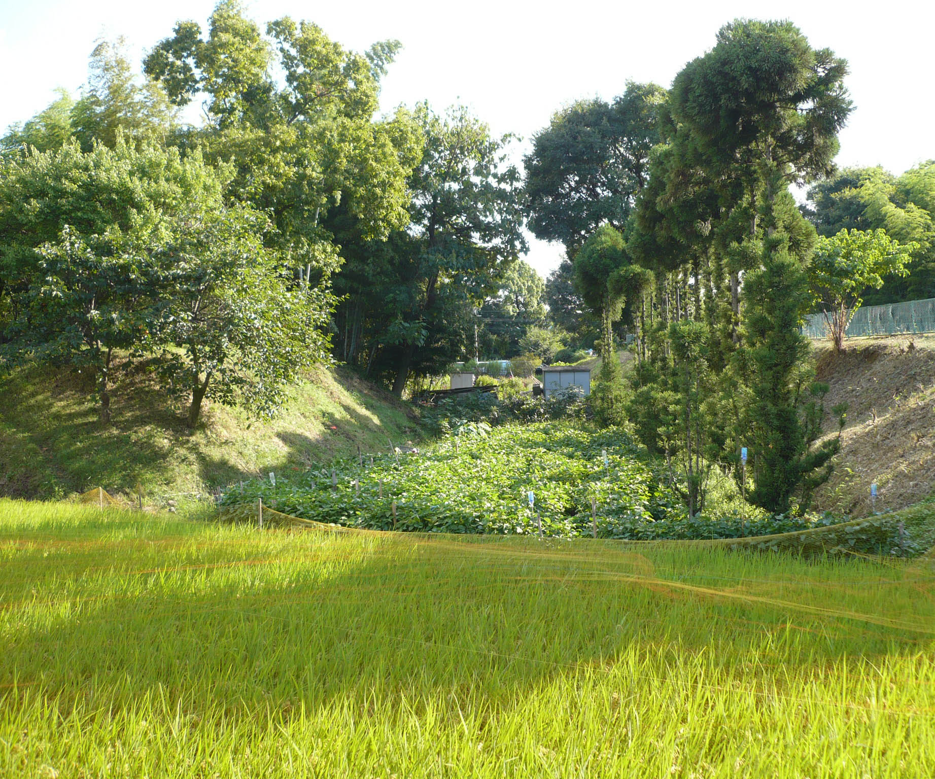 堀切